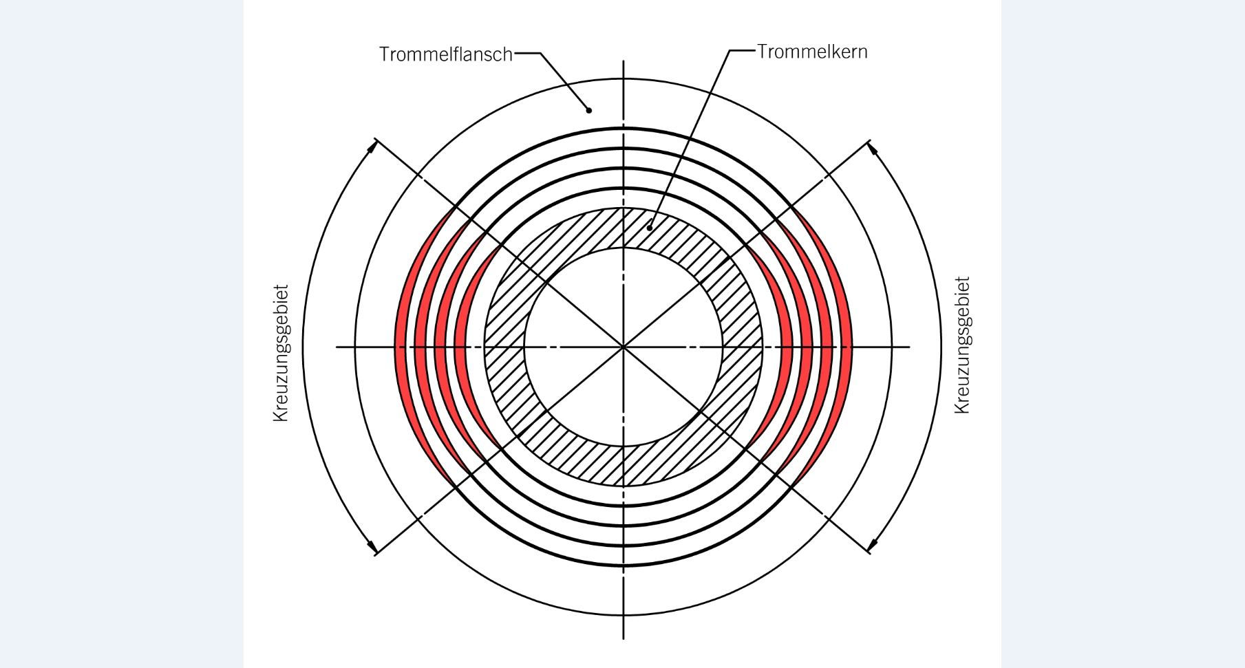 Kreuzungsgebiet